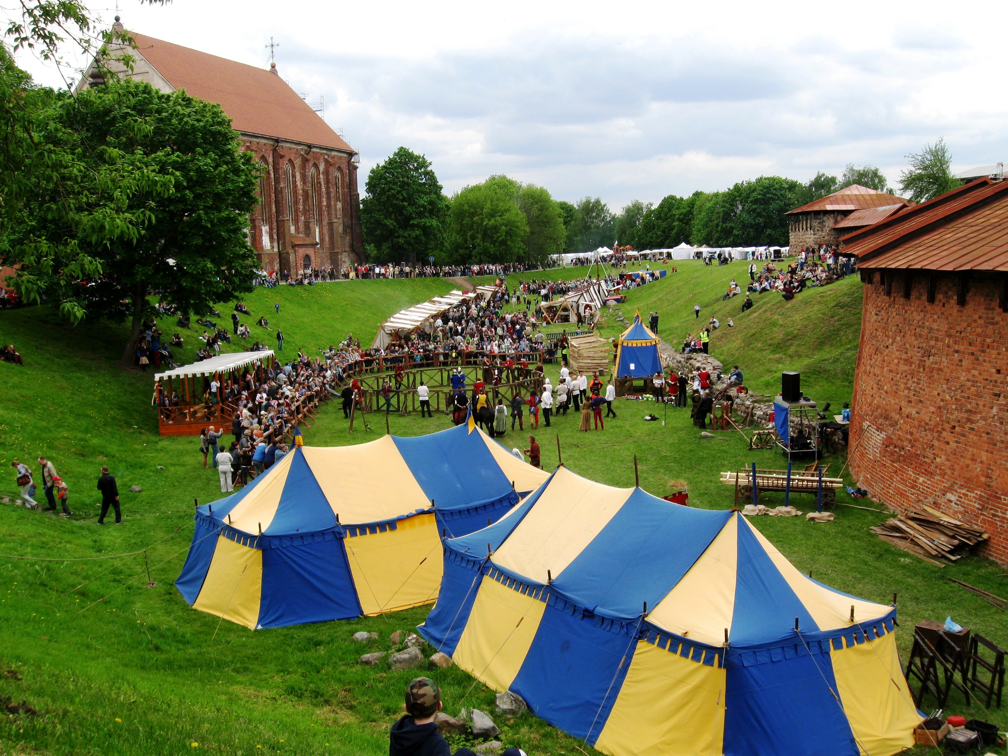 Kaunas, Hansa dienos